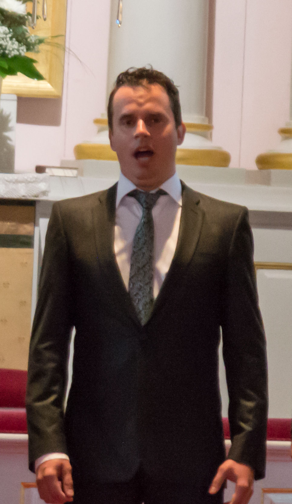 Juhana Suninen, laulaja